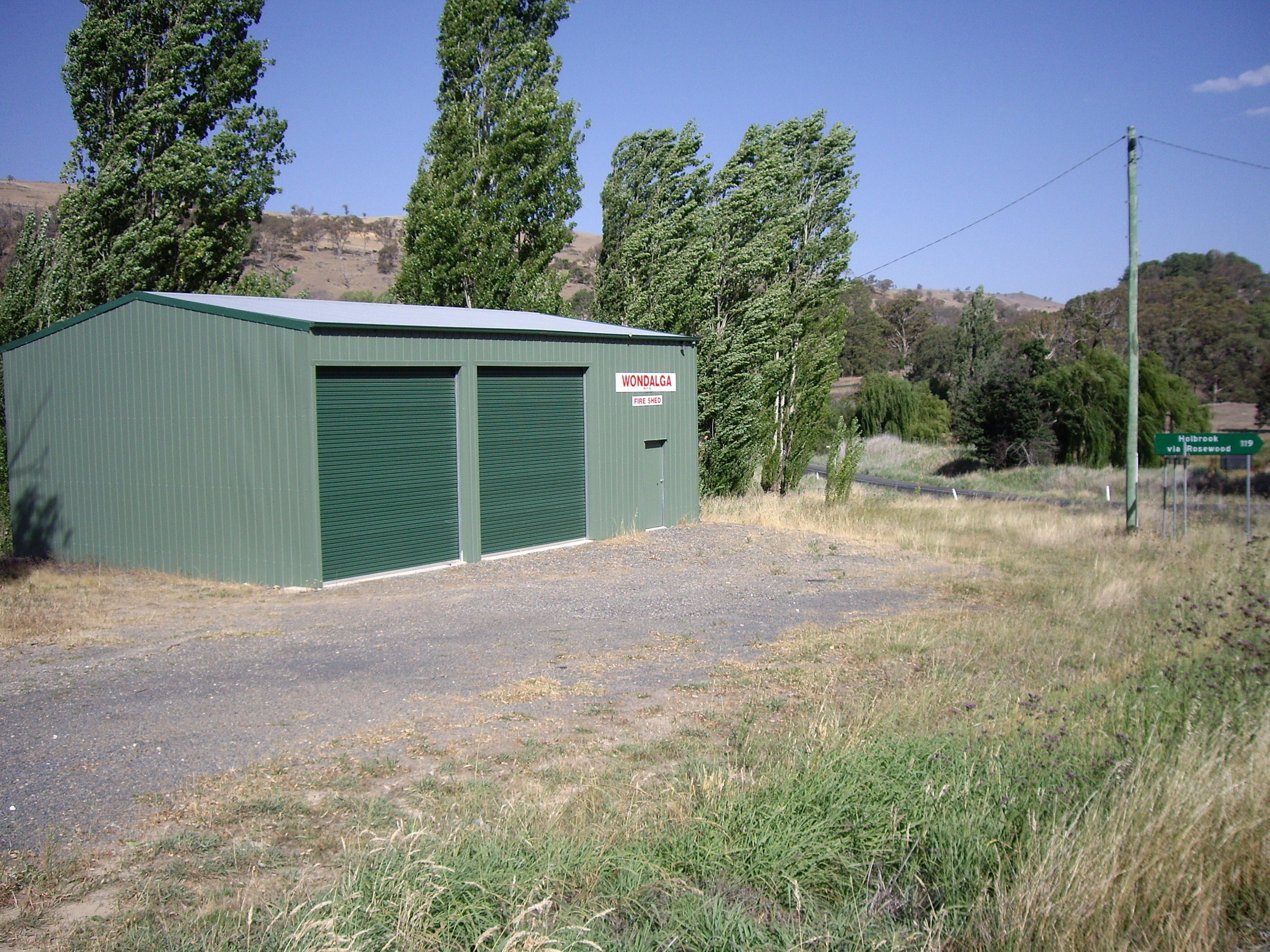 Wondalga